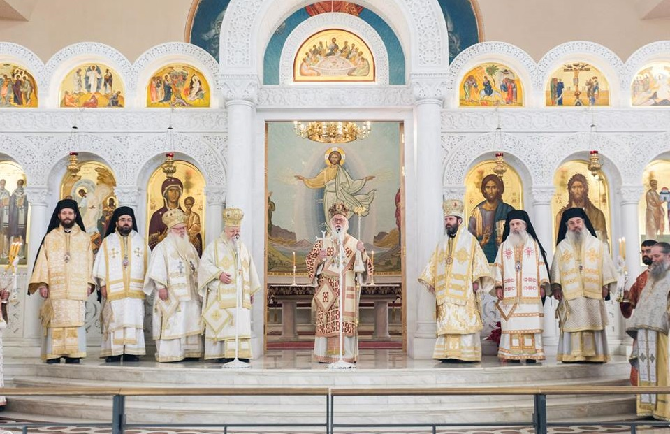 Sinodi i shenjtë 2015